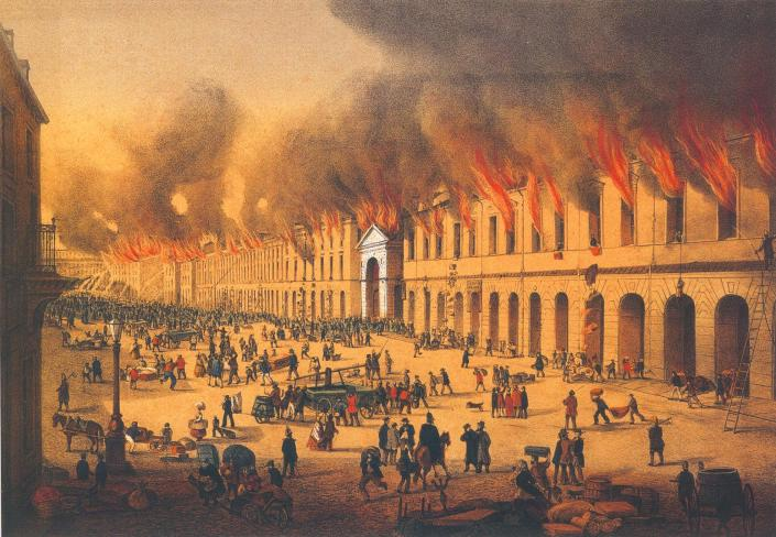 Пожар Апраксина двора 28 мая 1862. Вид с Садовой улицы. Литография